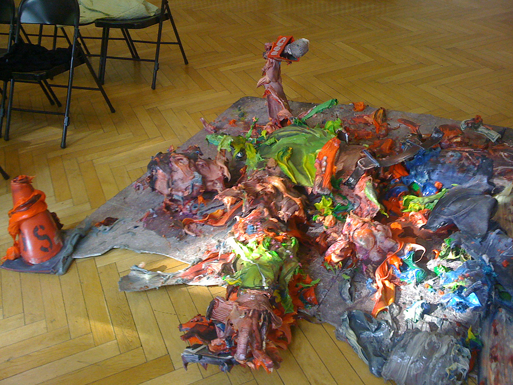 Fabián Marcaccio, CNN Structural Canvas, 2009, pigmentierte Tinte auf Leinwand, Aluminium, Alkydfarbe, Silikon, 20x183x127